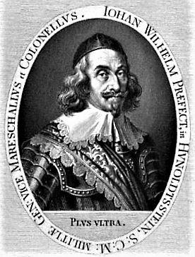 Johann Wilhelm von Hunolstein (1599; † 1664) Generalfeldzeugmeister ab 1653 Kommmandant in Ober-, und Niederschlesien / Reproduktion eines alten Stiches, Künstler unbekannt